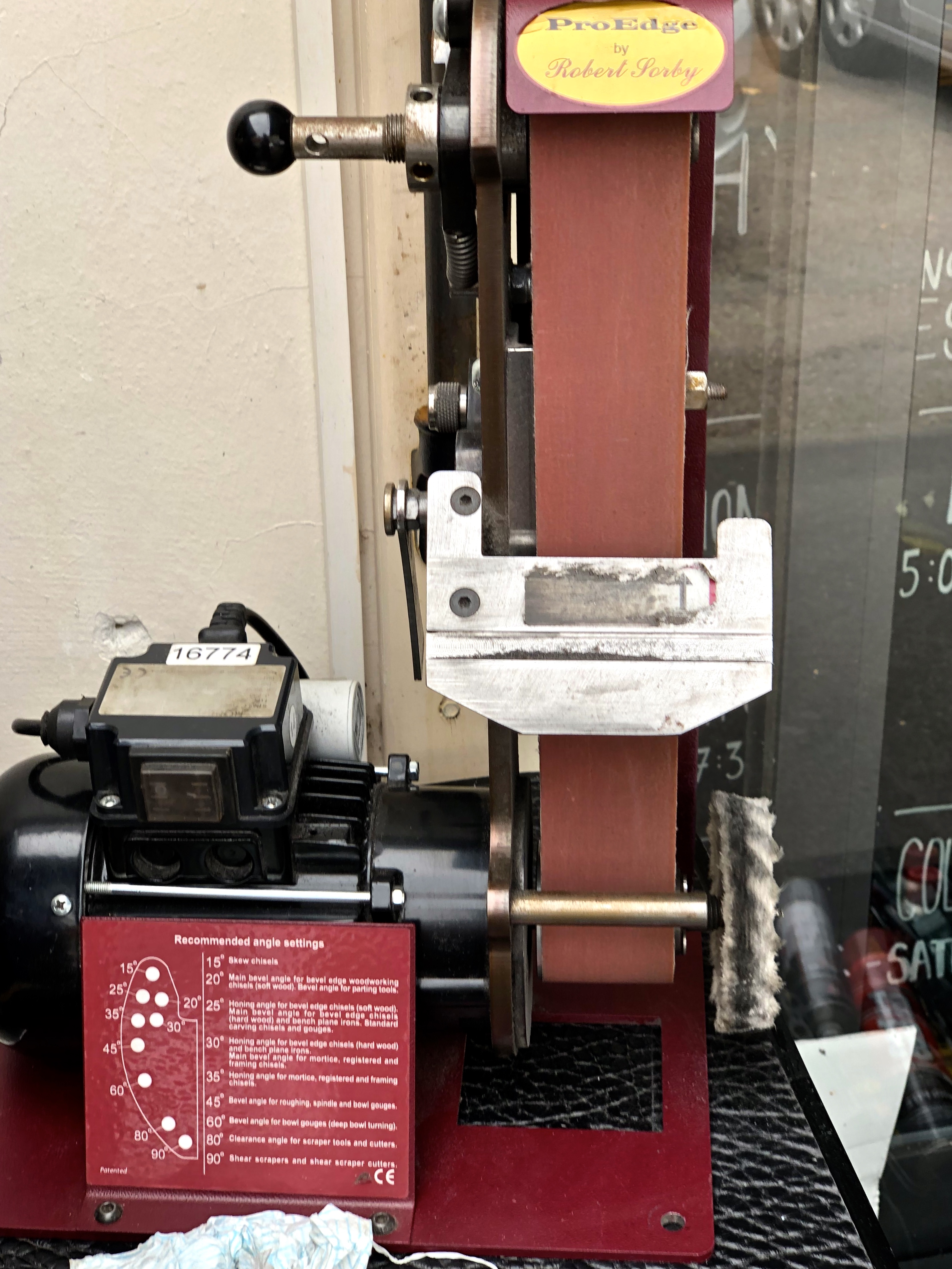 Mobile Bandschleifmaschine; hier eingesetzt von einem mobilen Schärf- und Schleifdienst („Messer- und Scherenschleiferei“) in Stockbridge in Hampshire, England.